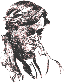 Портрет В.К. Аверина // "Диктатура пролетариата" в России: Политические деятели на заседаниях советов раб., солдат. и крест. депутатов, учредительного собрания, крестьянских съездов и проч. в декабре 1917 и в январе 1918 гг. : [Альбом] / Ю. К. Арцыбушев. - М. : Изд-во И. Кнебель, 1918. - 31 с. ил., портр. В 1926 году рисунки проданы автором Русскому заграничному историческому архиву (РЗИА) в Праге: сегодня ГА РФ (Р-7030, oп. 1). В настоящее время доступ к этому собранию полностью открыт.